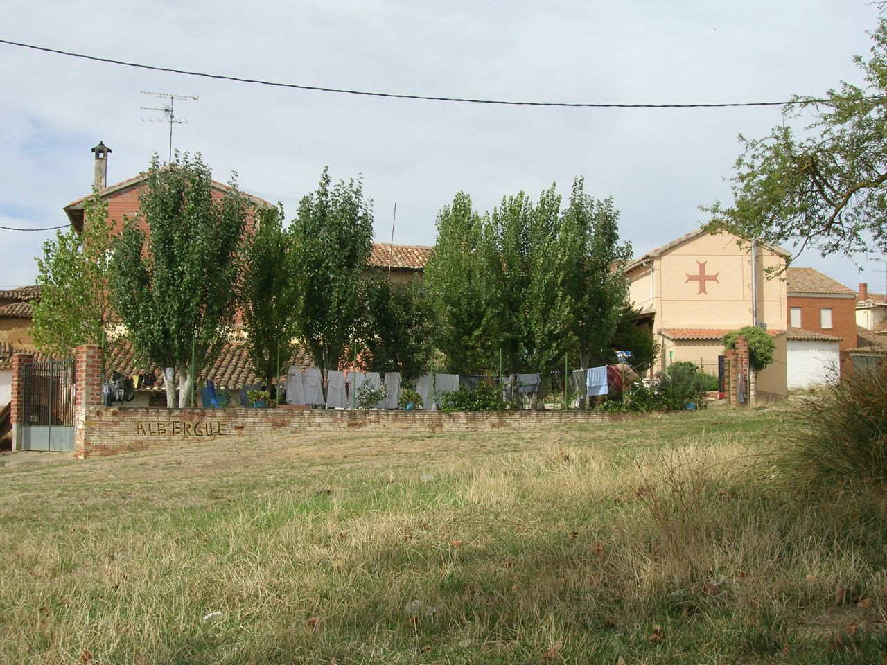 Pequeño y curioso pueblo de la provincia de Palencia que fue posesión de estos monjes guerreros, caballeros templarios dependientes de Villálcazar de Sirga.